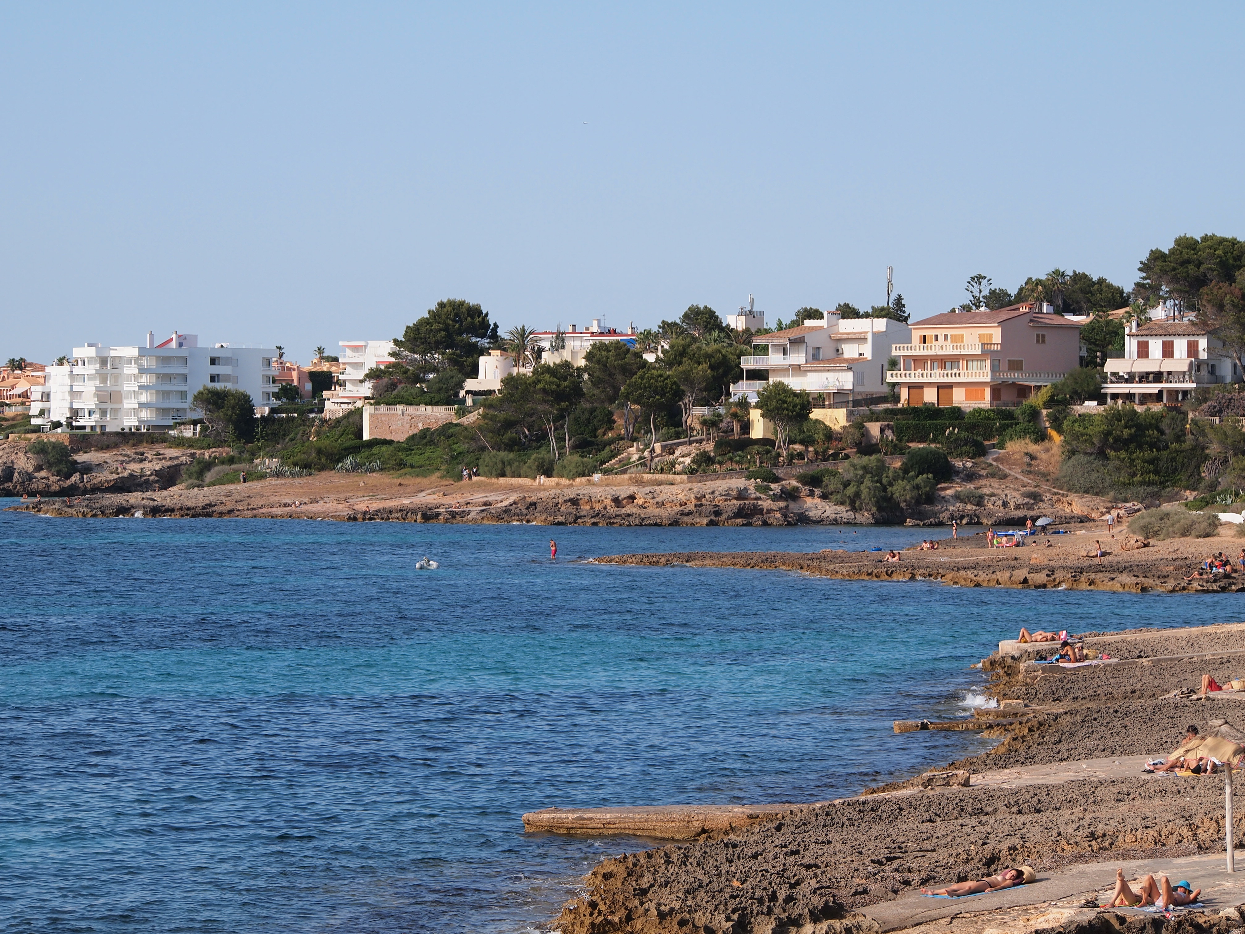 Urbanització de Cala Blava, Llucmajor, Mallorca, des del sud.